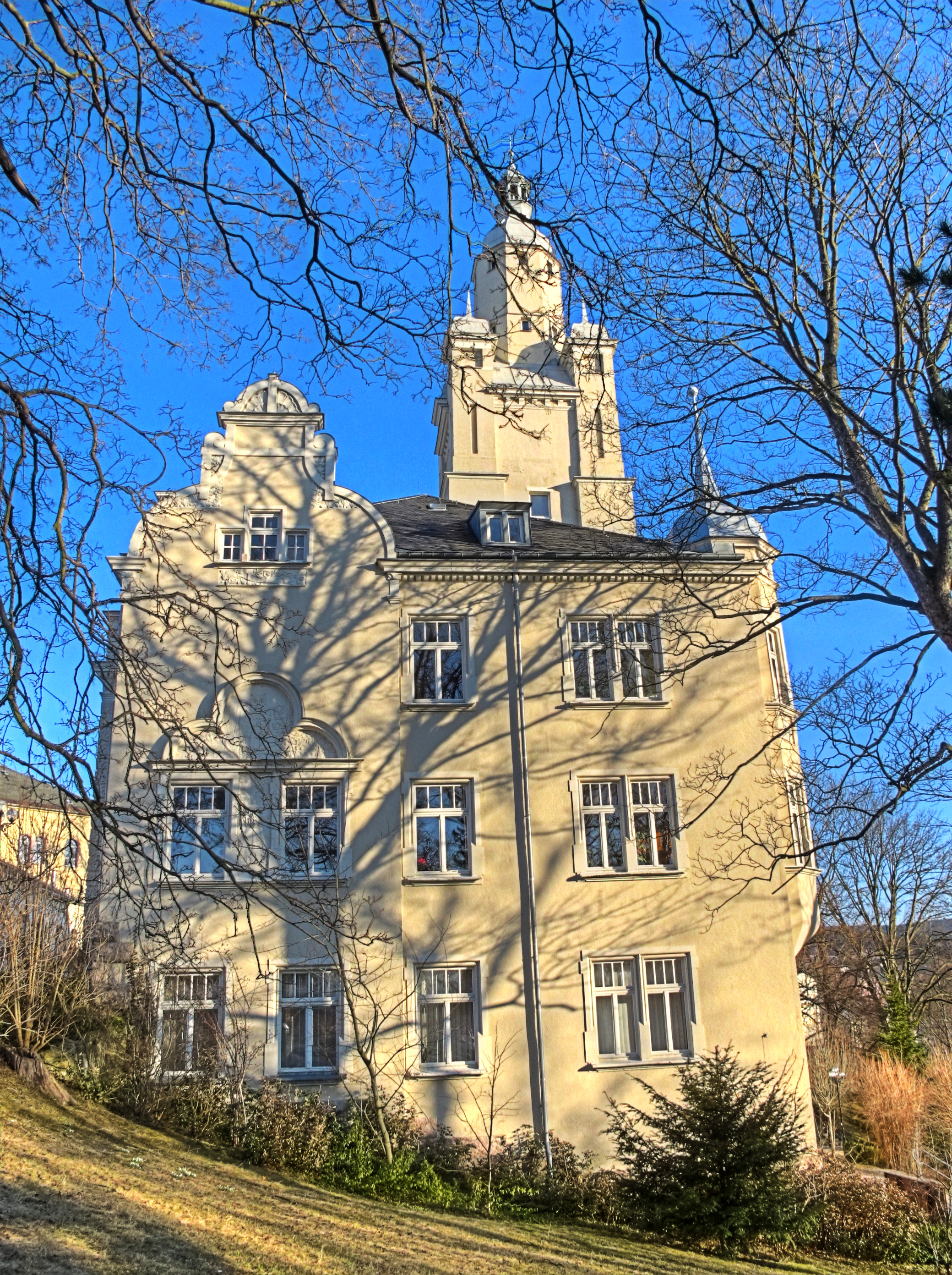 Deutschland, Sachsen, Eibenstock Rathaus